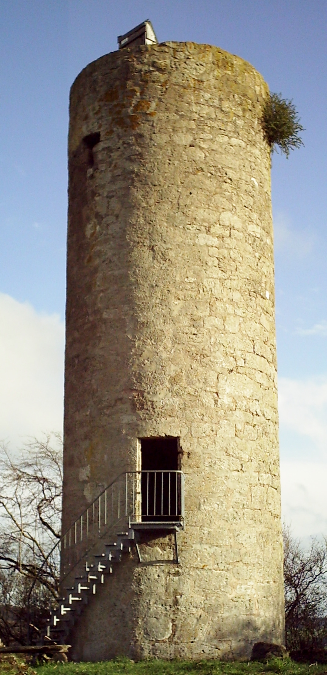 Donnerberger Warte Obermarsberg